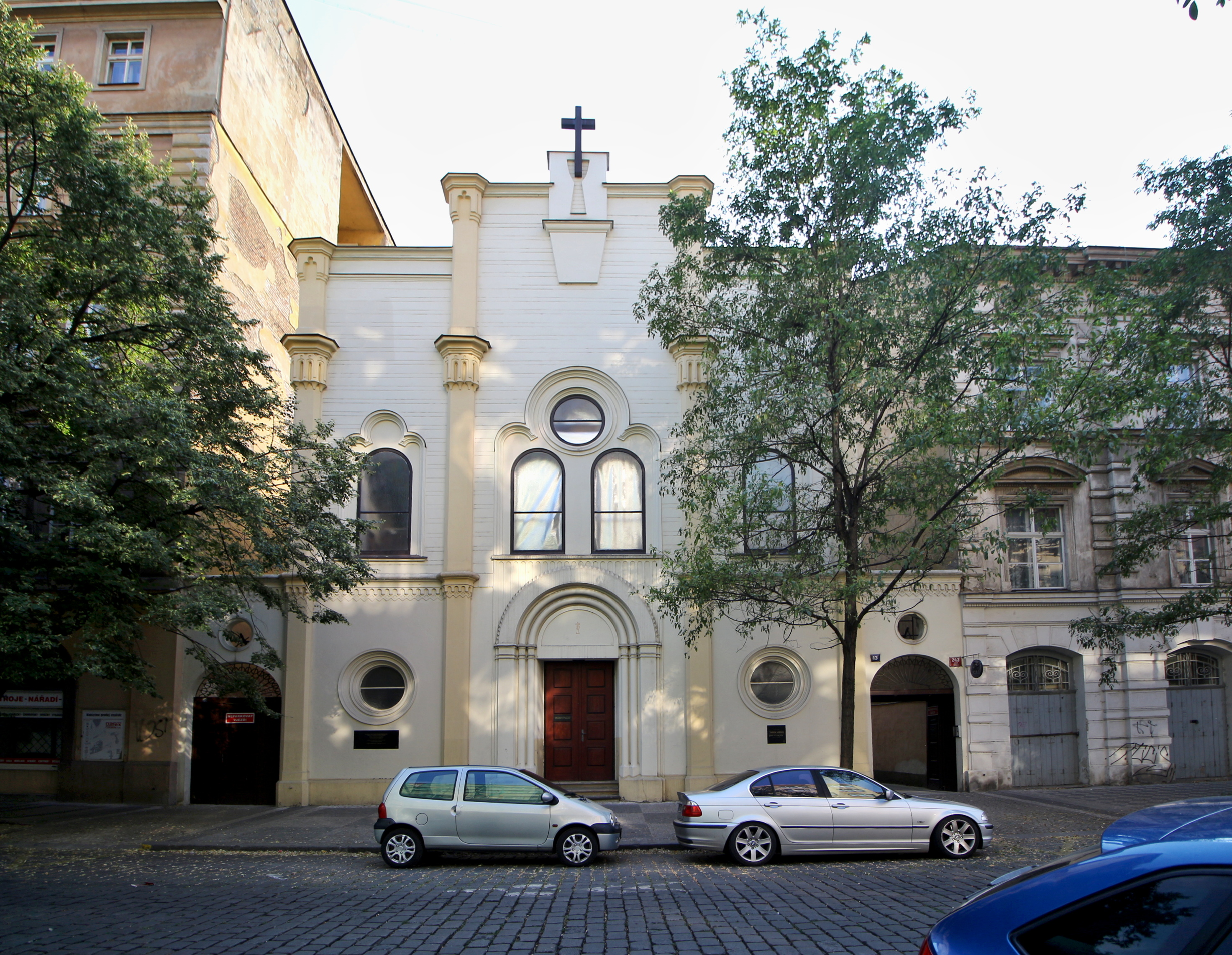 Bývalá synagoga v Praze 8-Karlíně